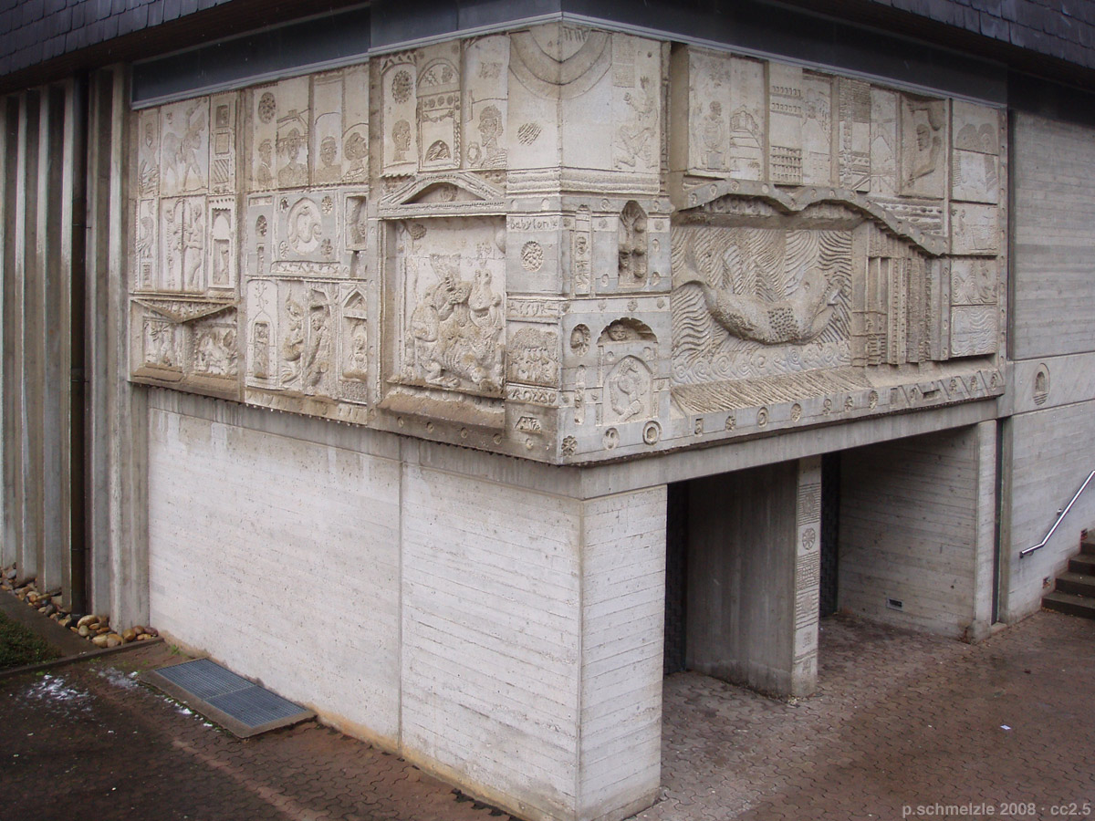 Jonasportal von St. Kilian in Osterburken